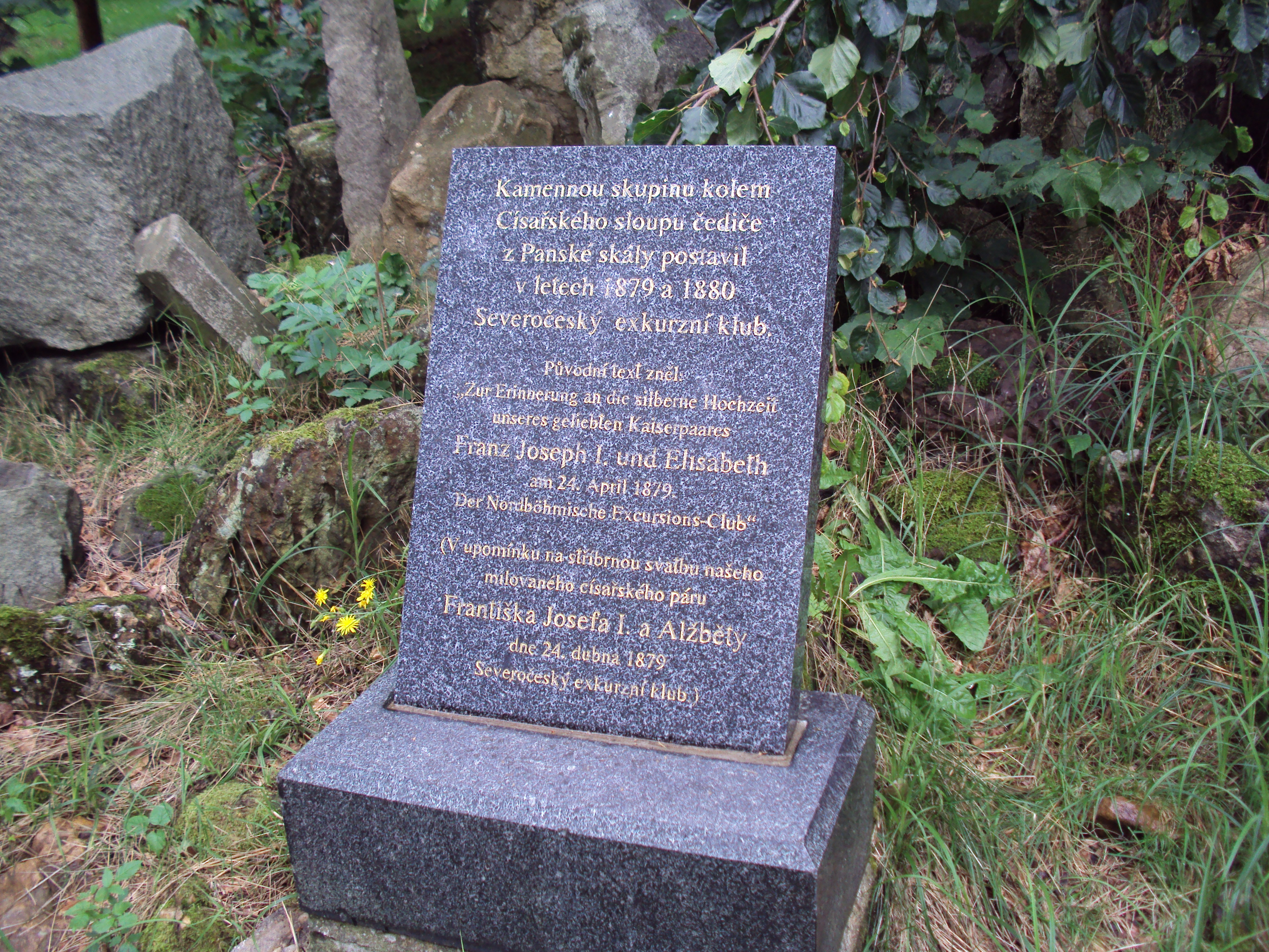 Deska na Císařském sloupu v Městském parku, detail